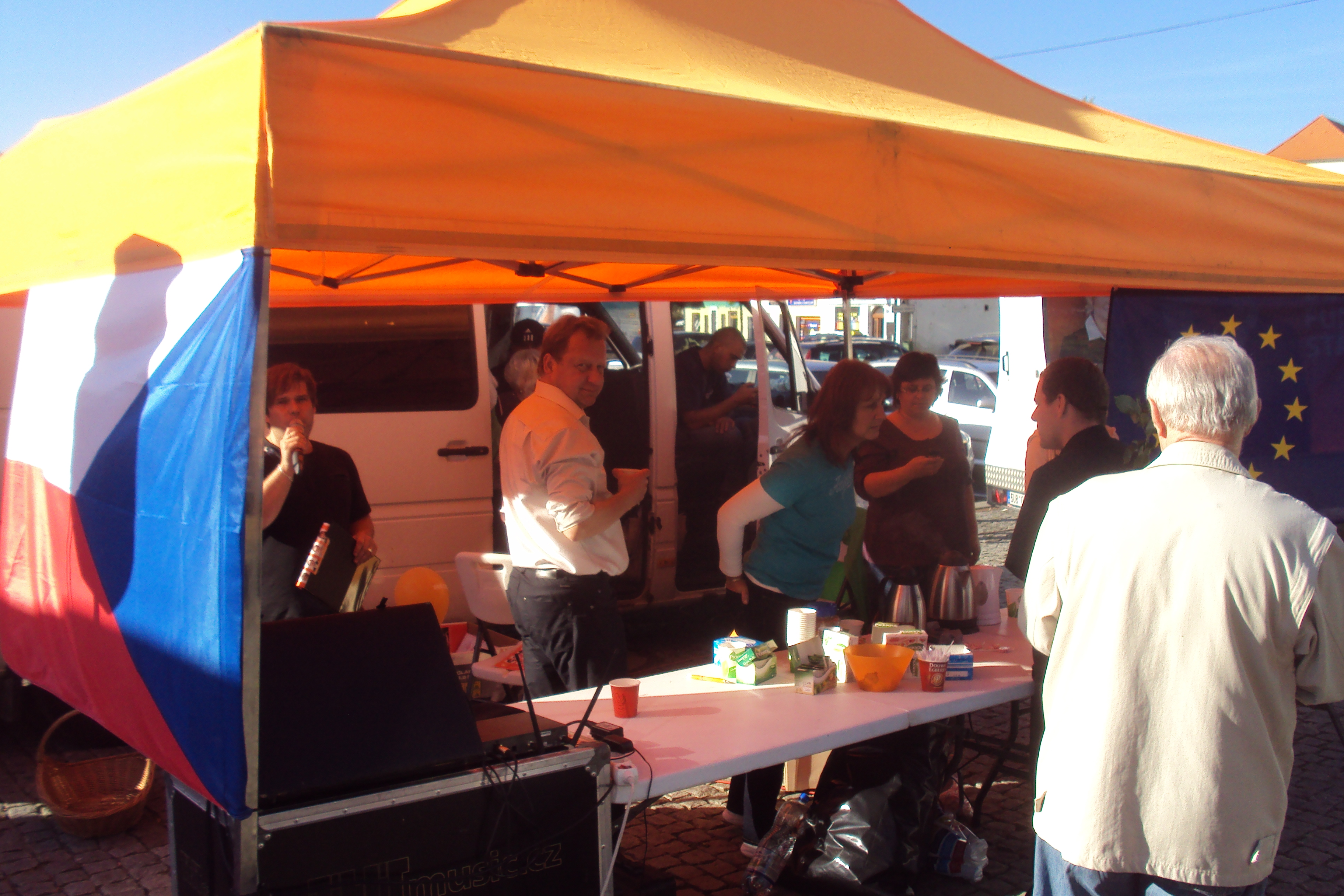 Předvolební mítink ČSSD v České Lípě, říjen 2013